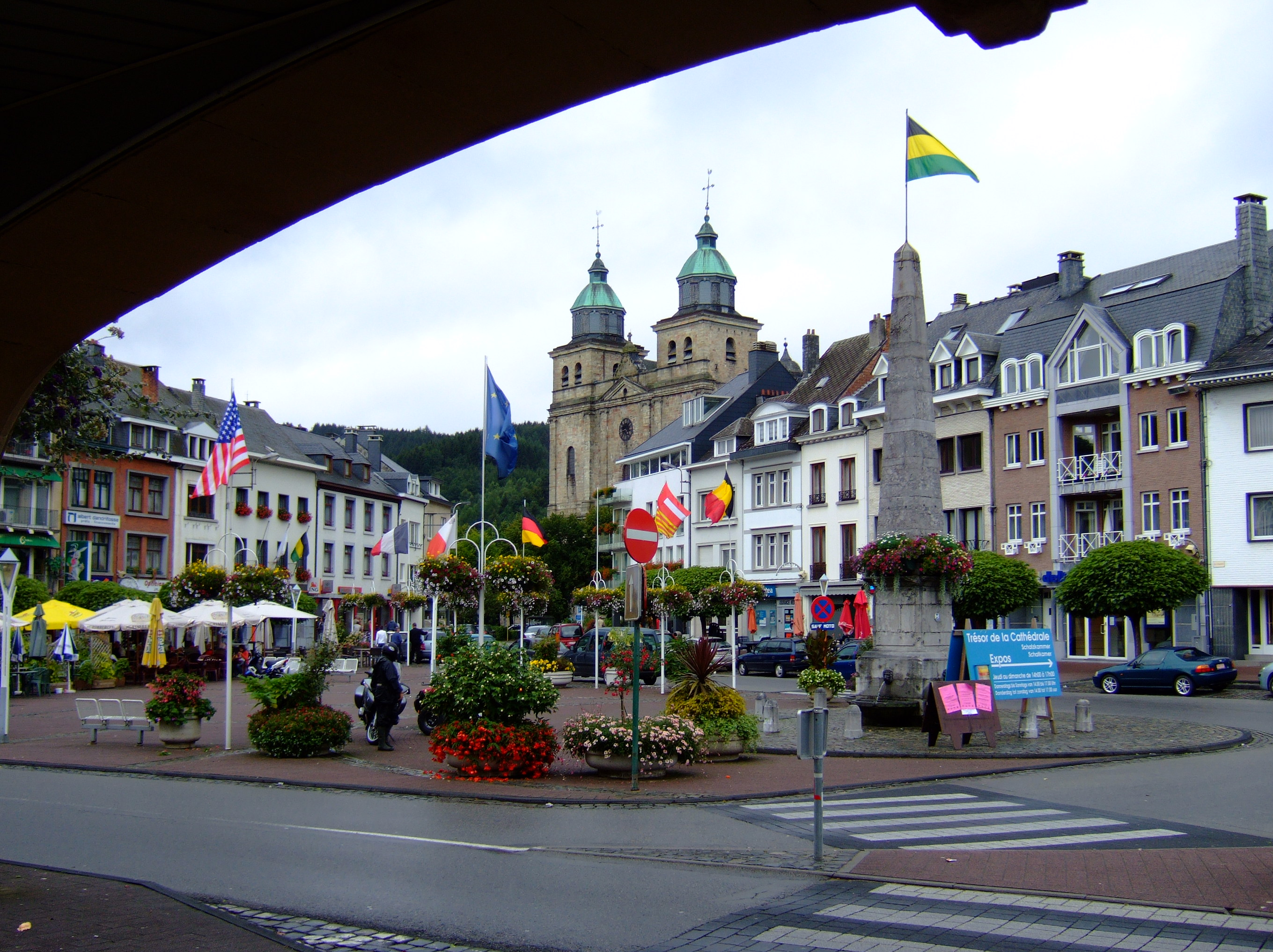 Place Albert I. mit Obelisk in Malmedy - Belgien